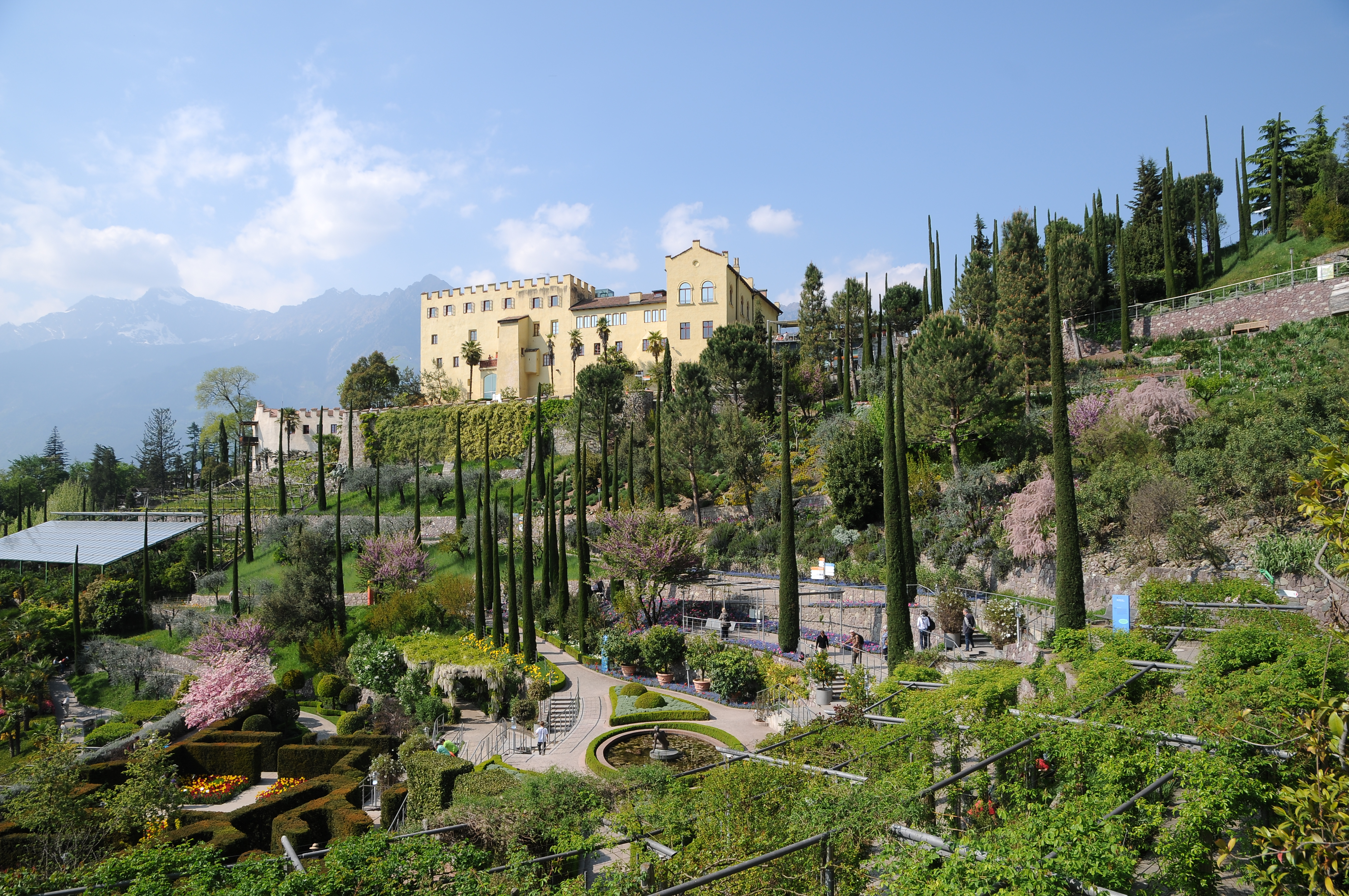 Diese Datei zeigt das Baudenkmal mit der Nummer 15889 in Südtirol.